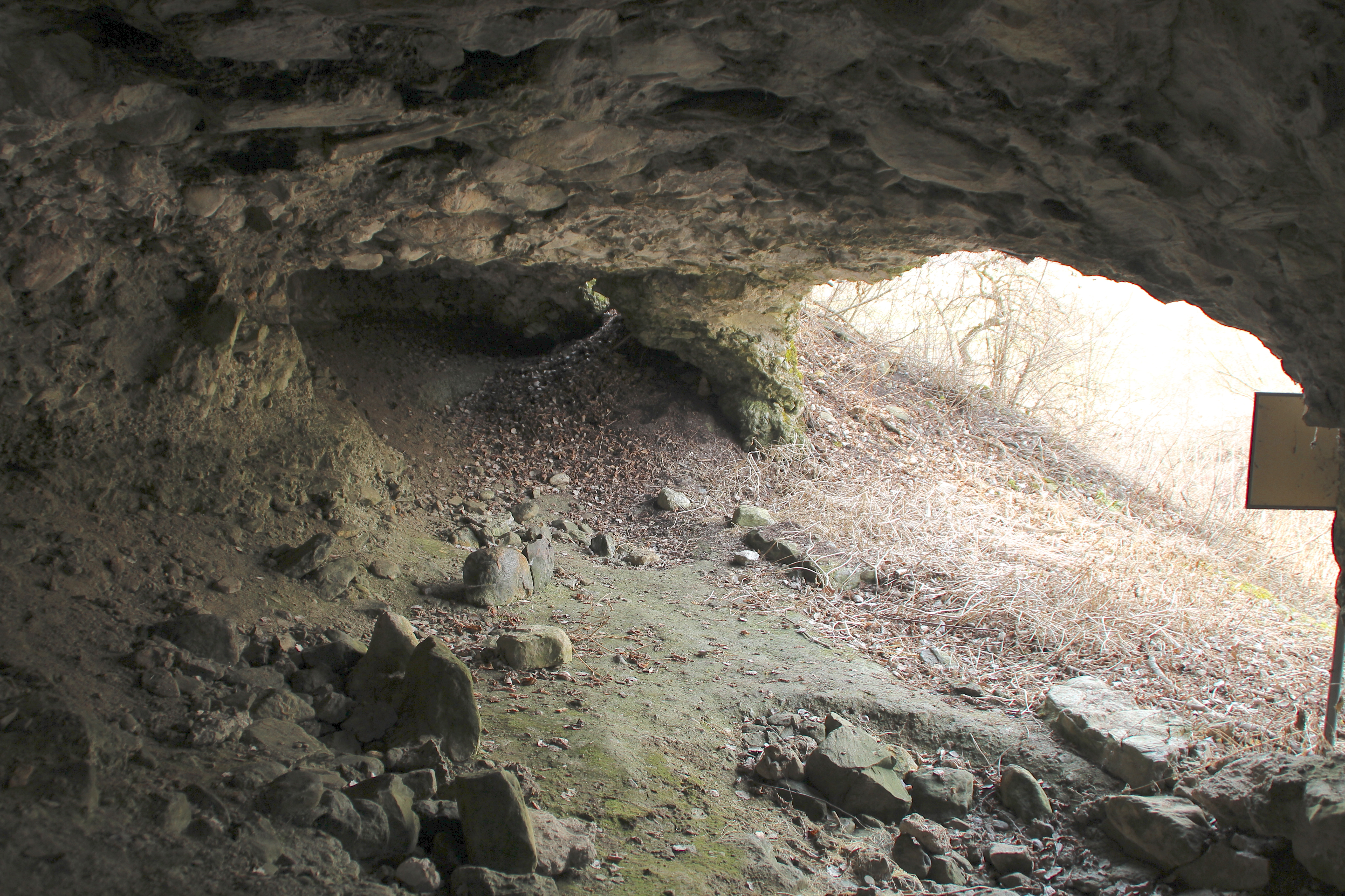 Kulthöhle Zillis